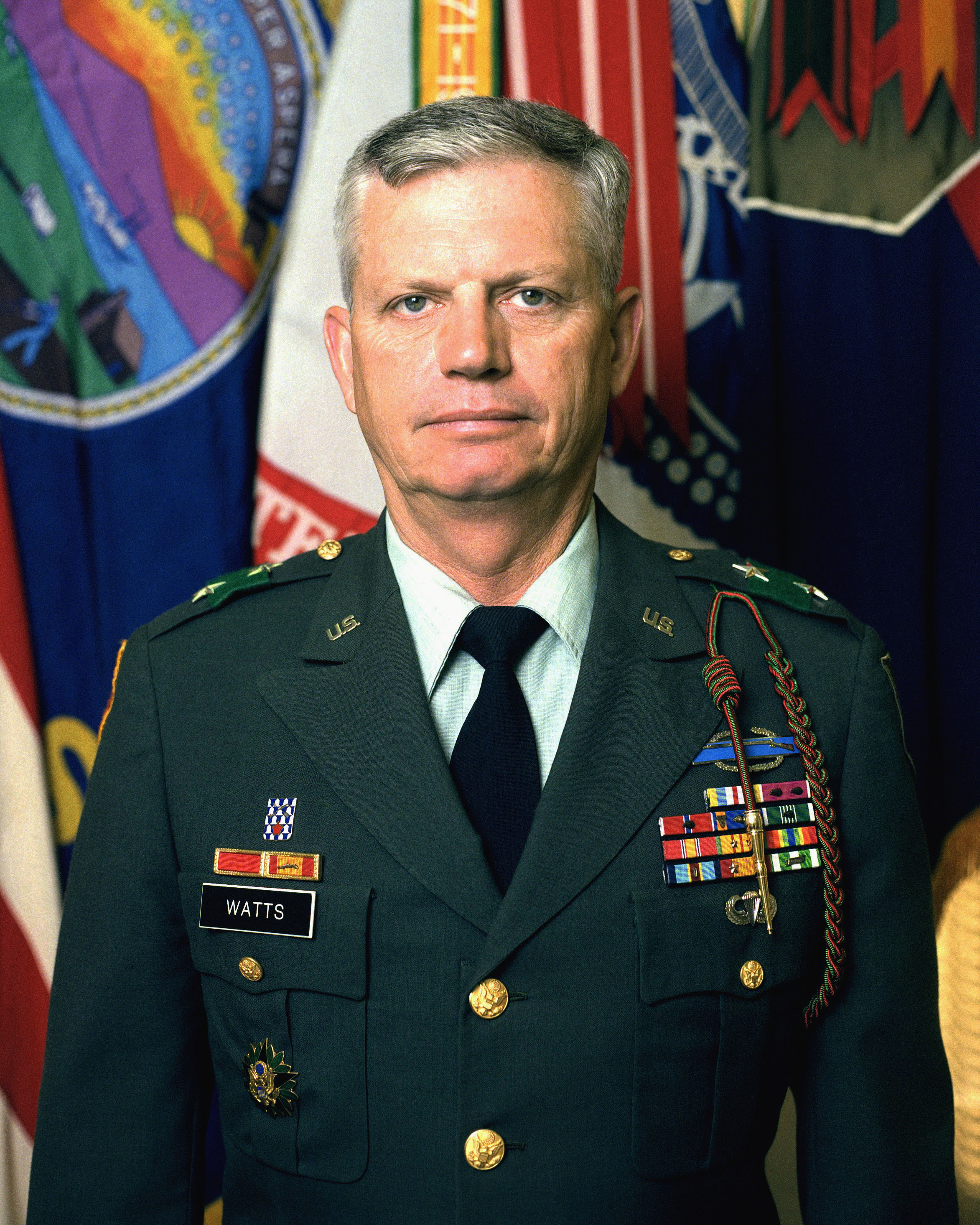 MG R.L. Watts